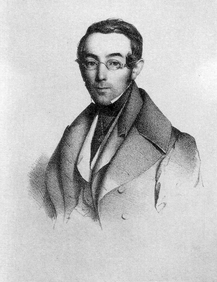 Johann Baptist von Graf (1798-1882), Abgeordneter der Paulskirche